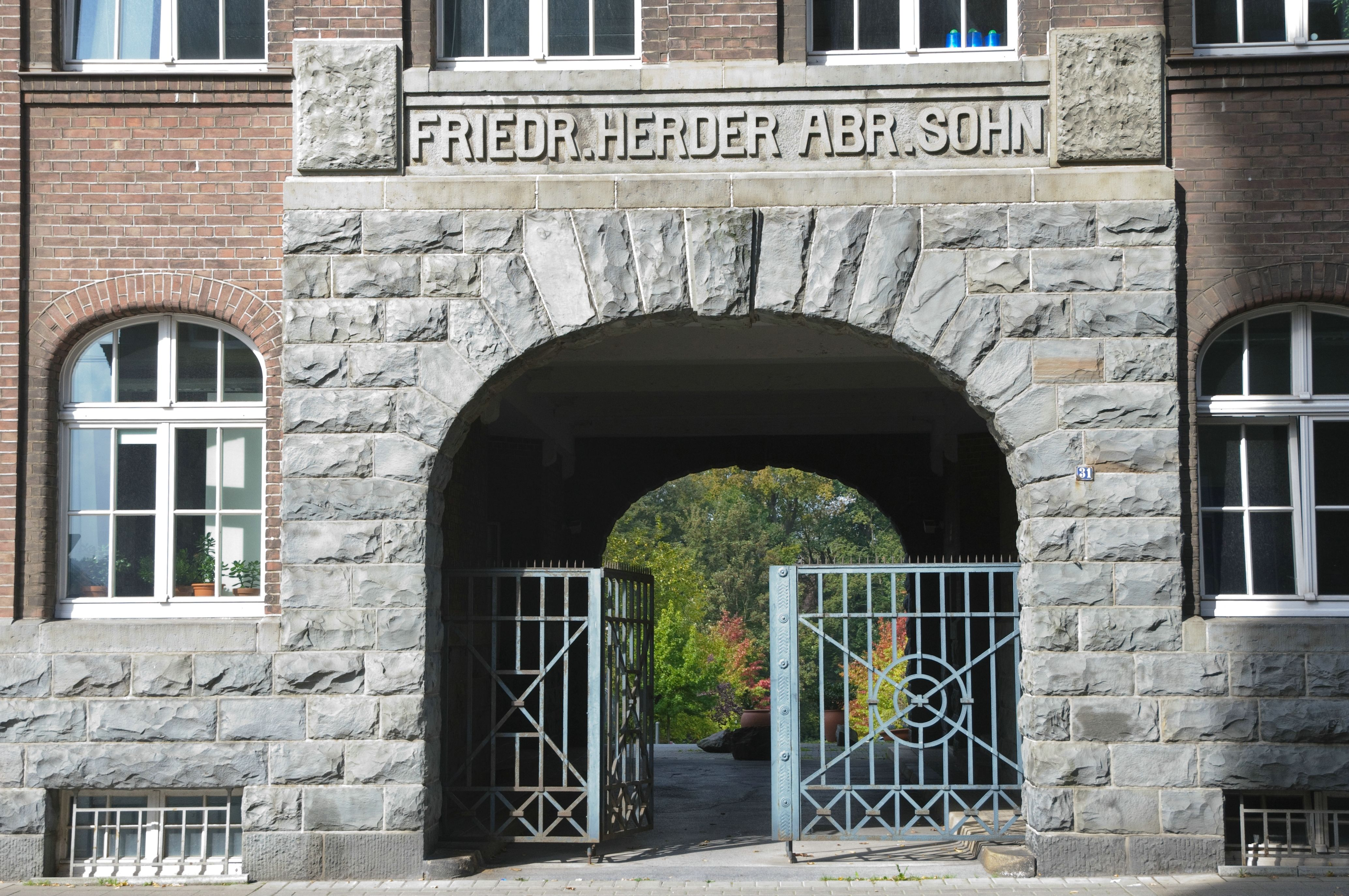 Friedrich Herder Abraham Sohn, Eingang